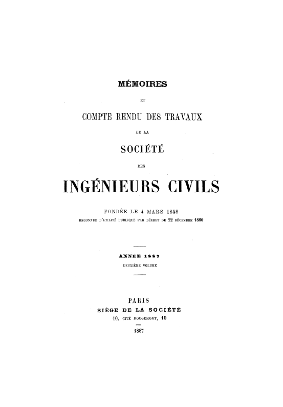 Titre du périodique de la Société des ingénieurs civils intitulé « Mémoires et compte rendu des travaux de la Société des ingénieurs civils - Année 1887 - DEUXIÈME VOLUME »